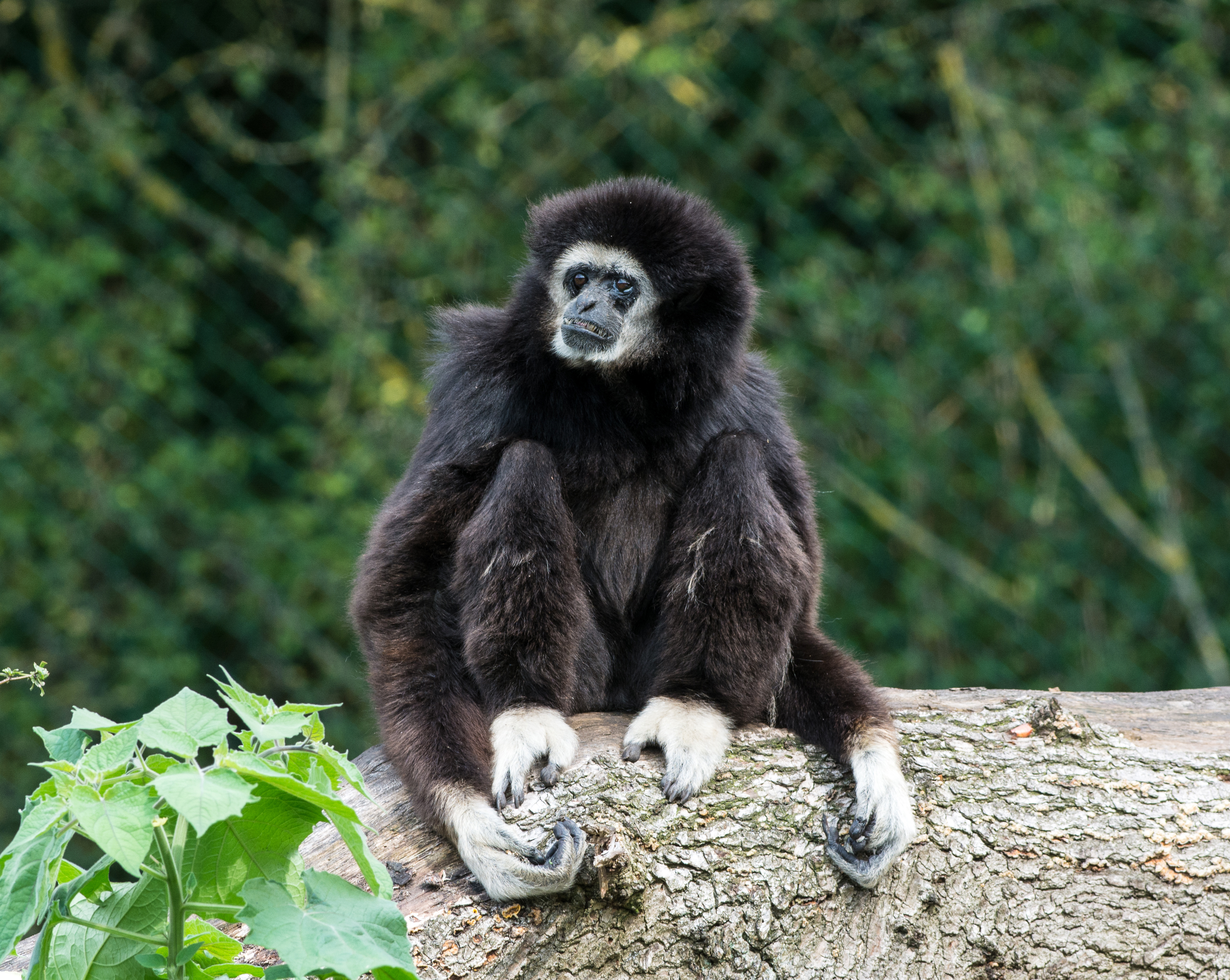 Hylobates Lar im Serengeti-Park Hodenhagen 2017